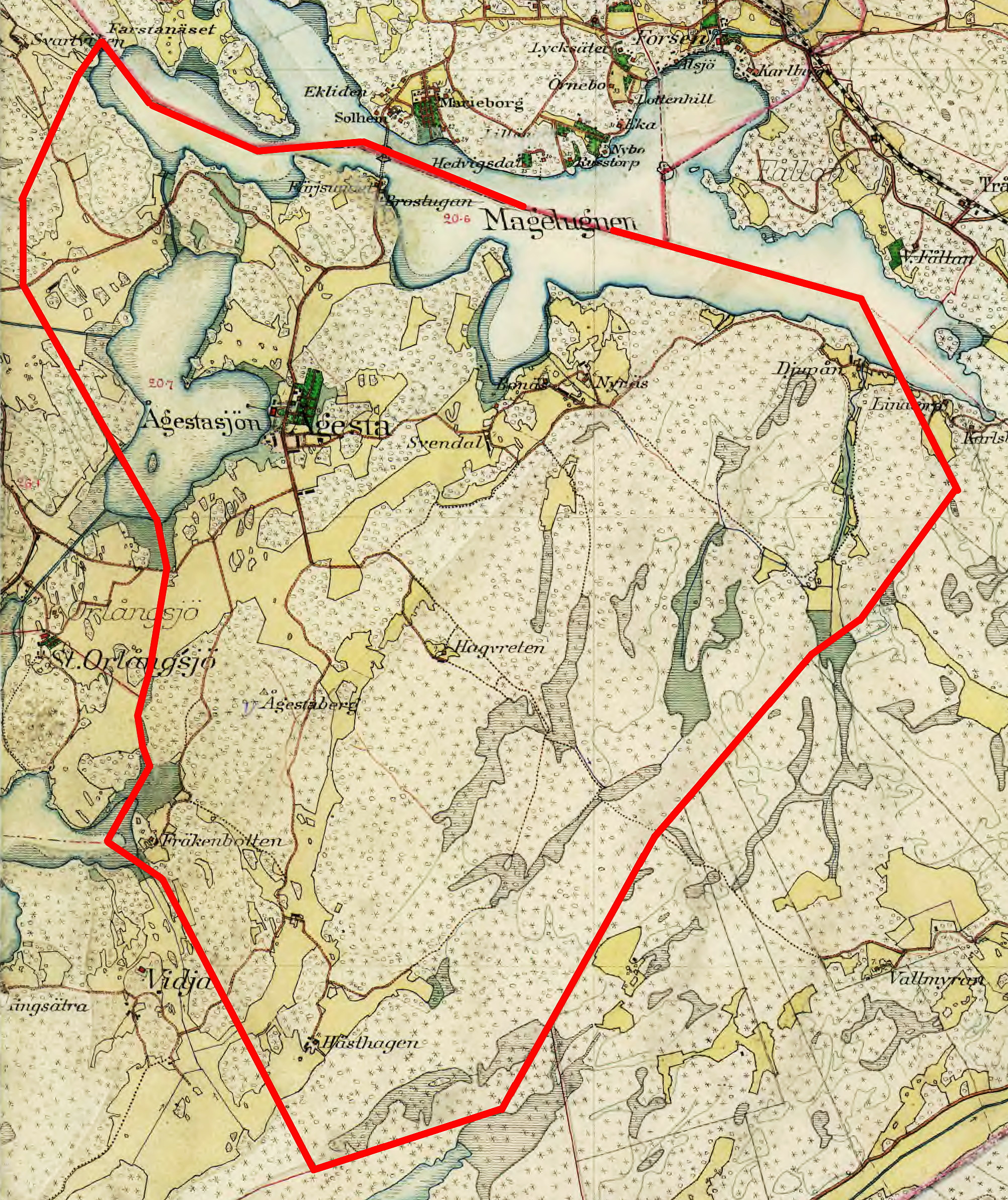 Ågesta gårds ägor på Häradsekonomiska kartan